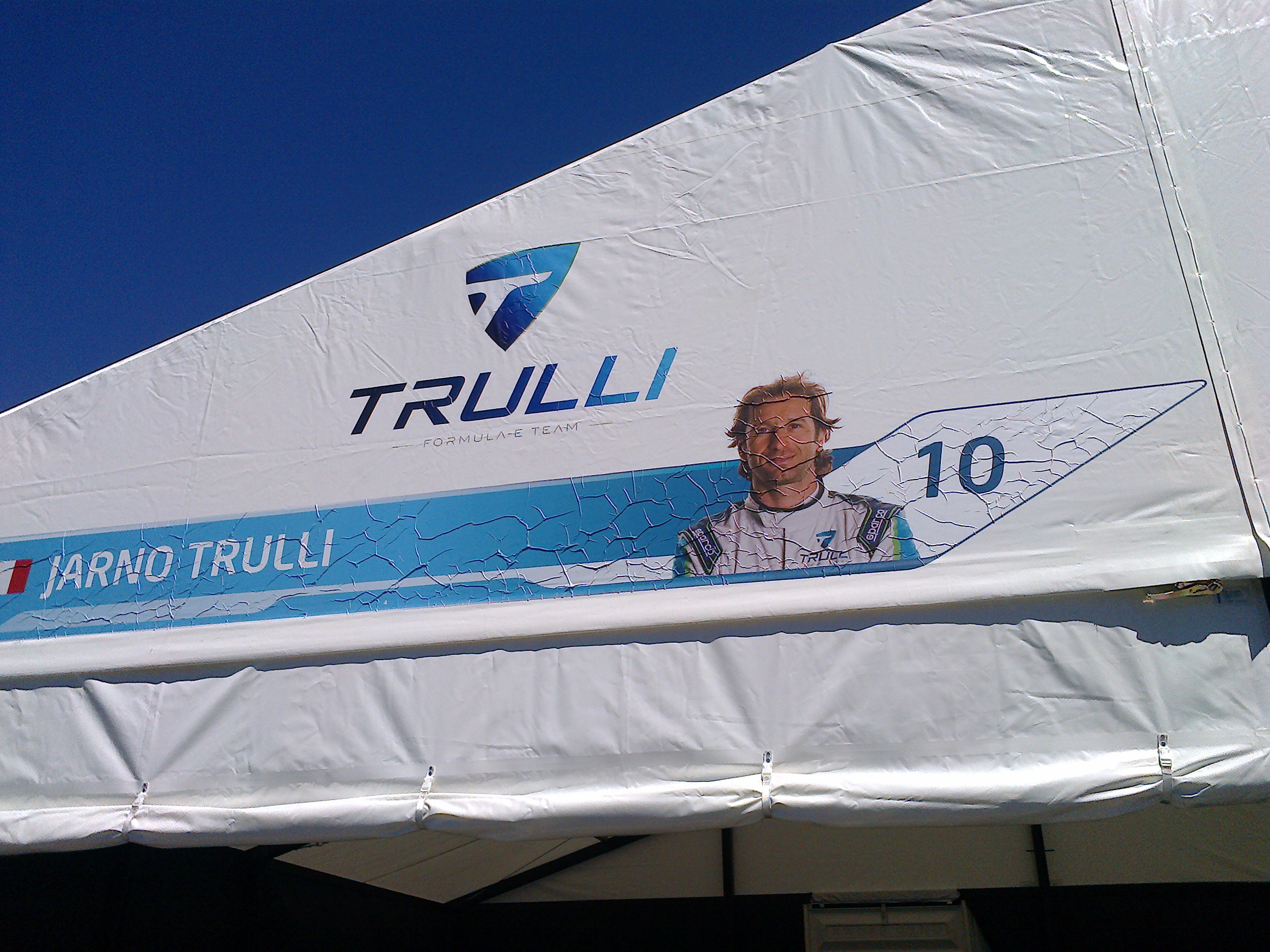 aaaaa